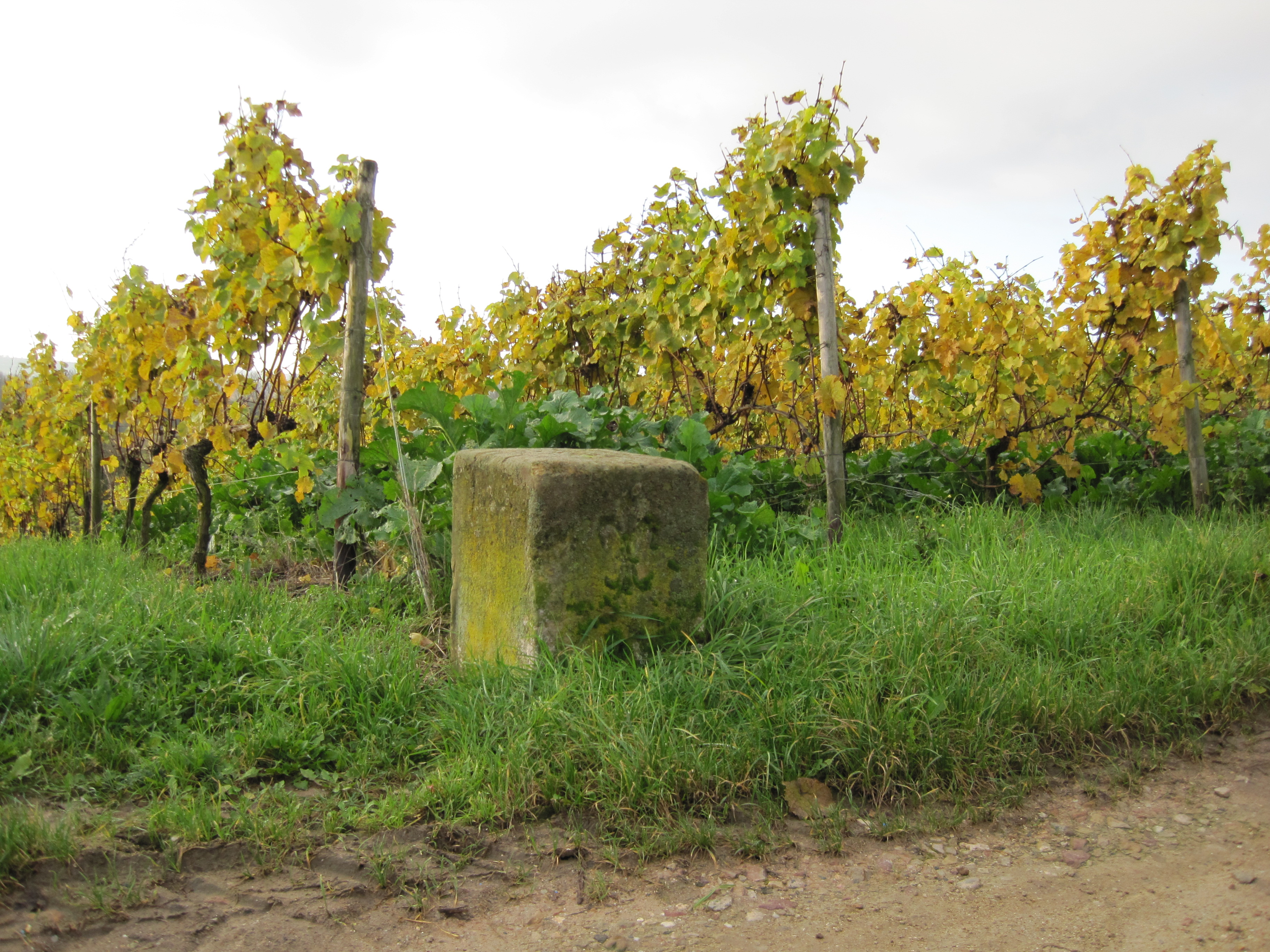 Güterstein des Weingutes Langwerth von Simmern, der den ehemaligen Besitz in der Weinlage Hattenheimer Mannberg markiert.Die Lilie steht für das Wappen der Familie Langwerth von Simmern. Hattenheim im Rheingau.